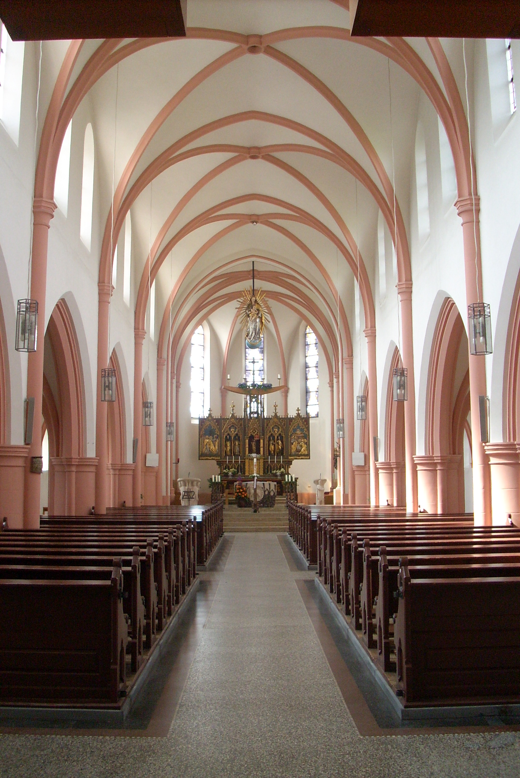 Katholische Pfarrkirche „Zu Unserer Lieben Frau“ Kulmbach